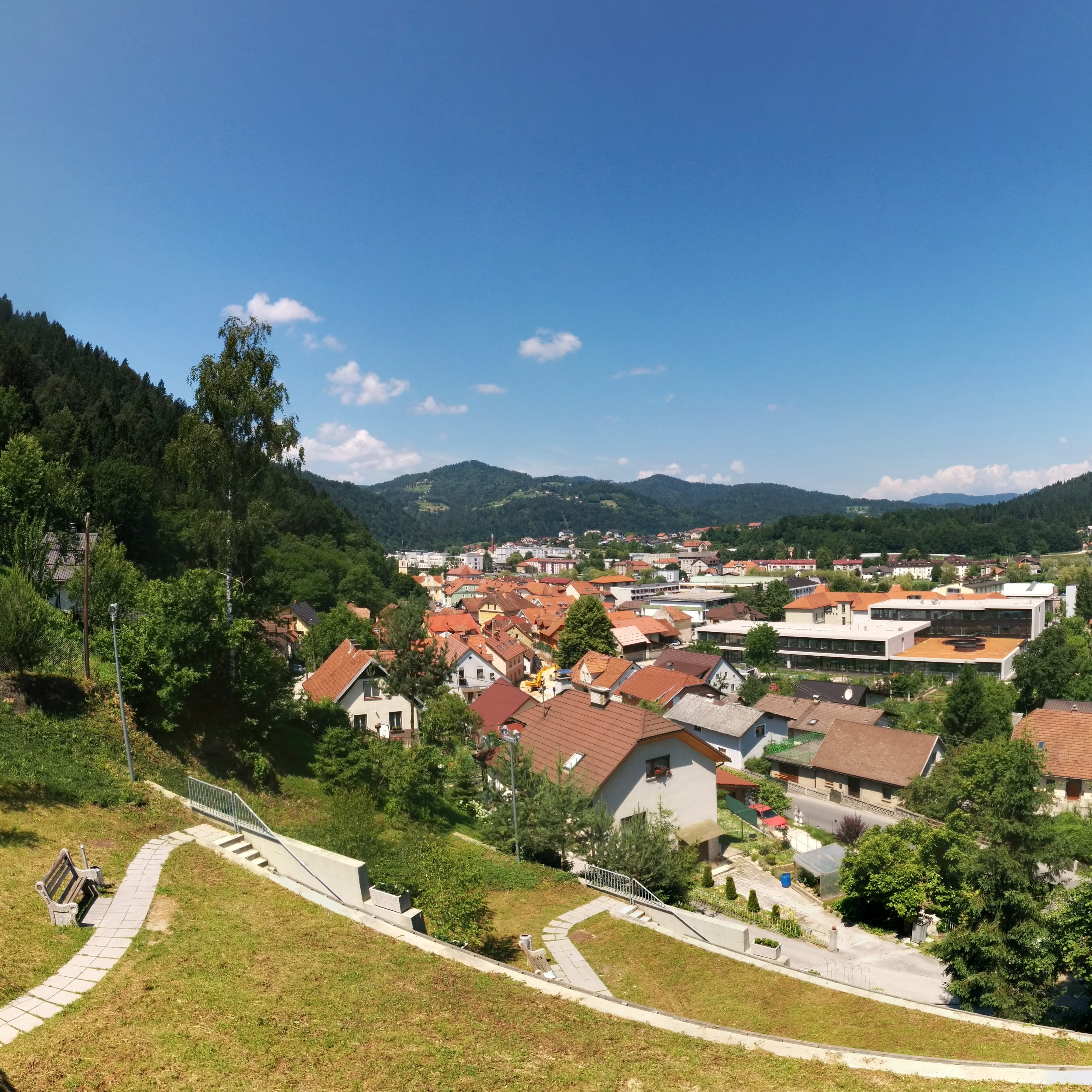 Litija, Slovenija